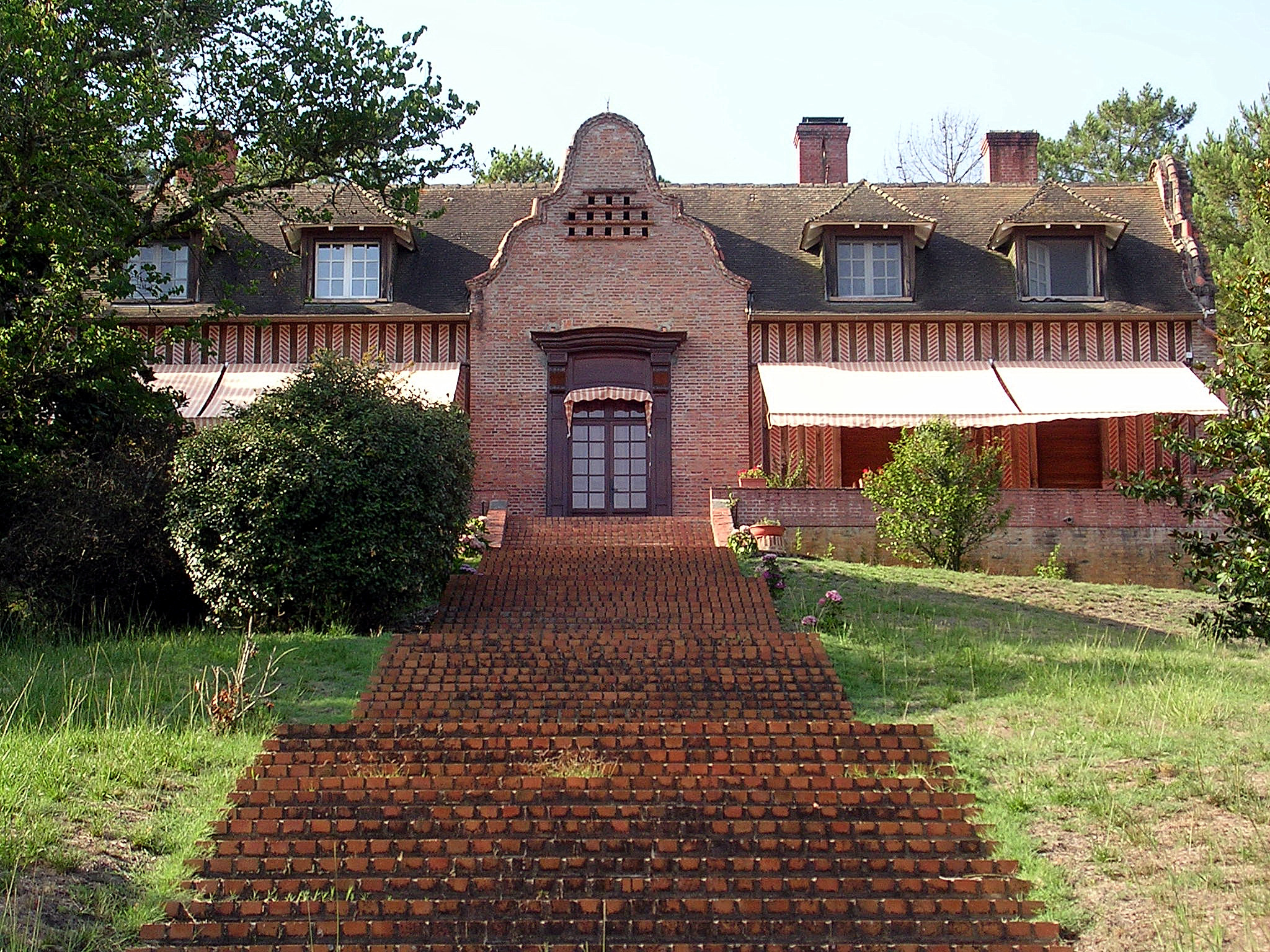 Le château de Woolsack, à Mimizan, dans les Landes (France) Photo prise par Jibi44 en juillet 2006